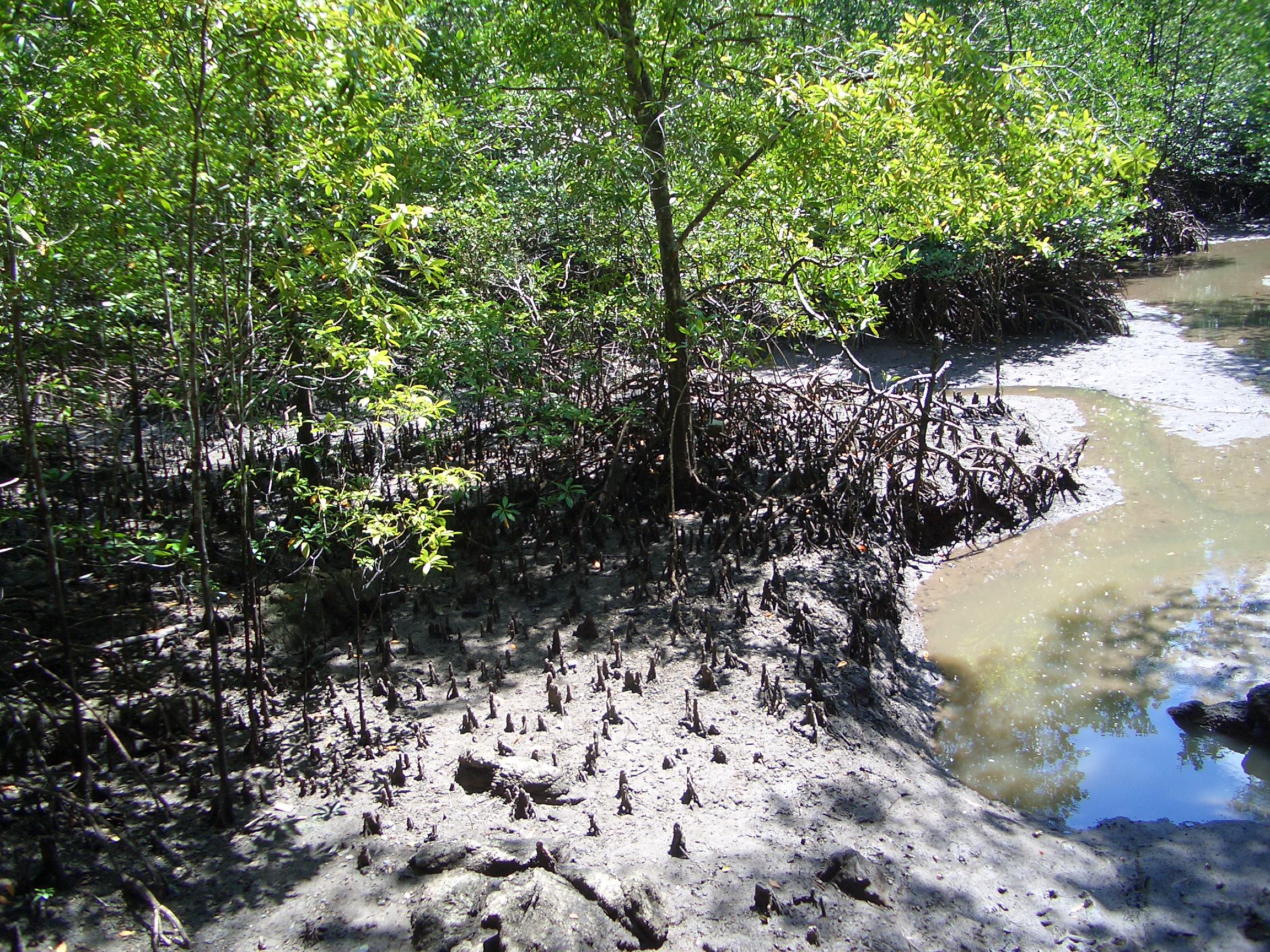 Mangrove4